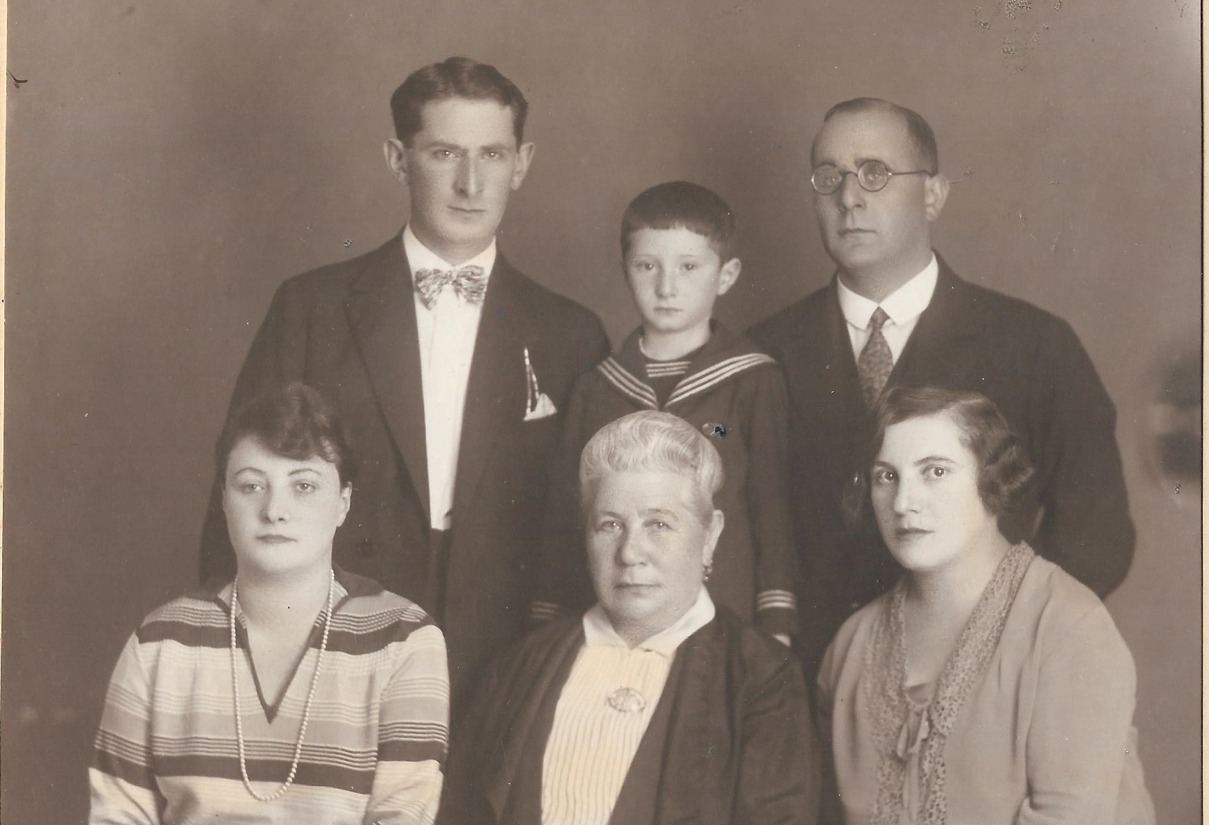 משפחת וינטרויב בפשמישל פולין, מימין לשמאל האב בנימין הנער אדם בבגדי מלח והדוד נחום וינטרויב. יושבות האם אנה הדודה פרימה ואשת הדוד נחום.1927